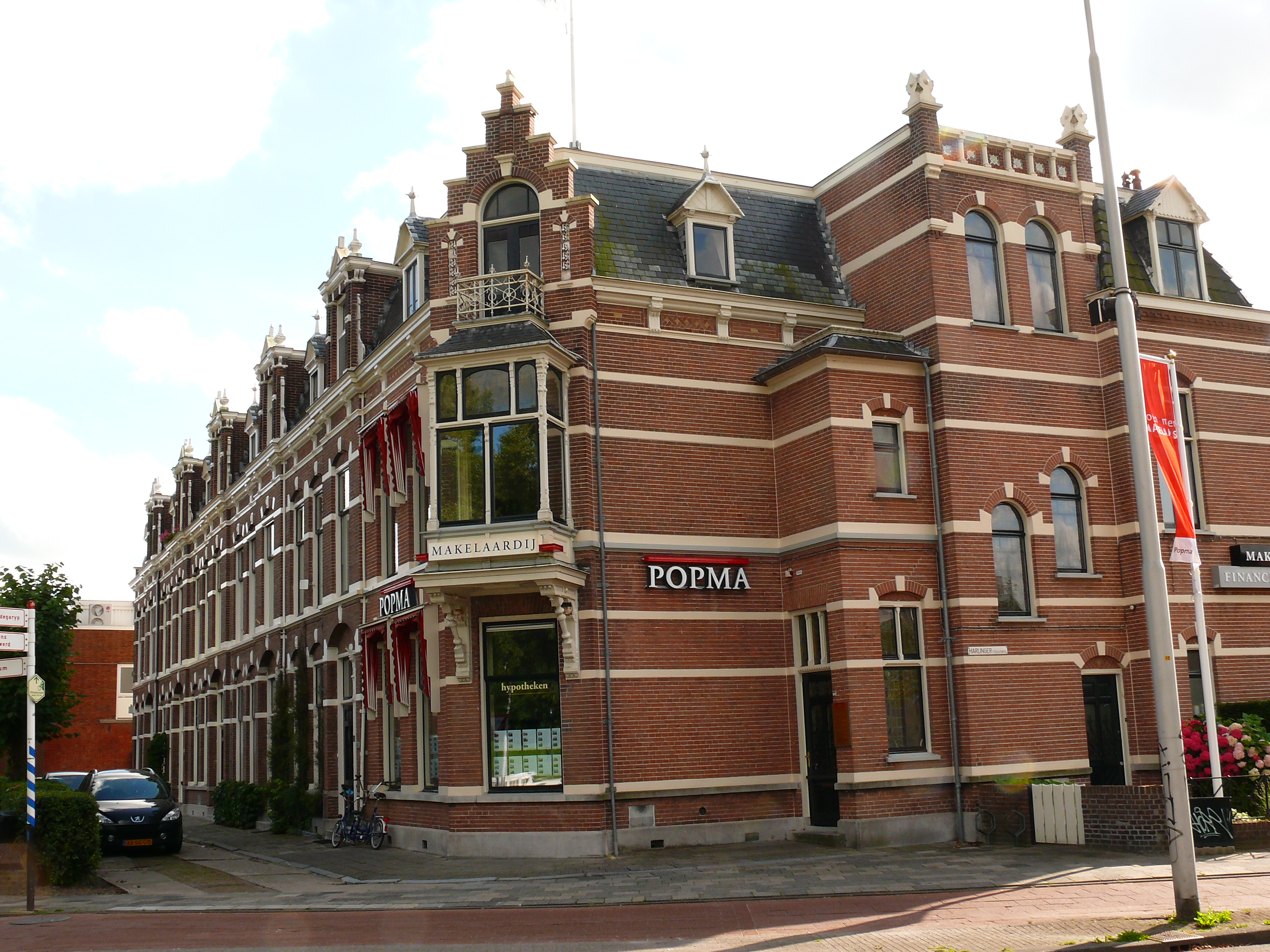 Een blok met etagewoningen (met vijf onder- en vijf bovenwoningen) en een herenhuis op de hoek van de Harlingerstraat en de Harlingerstraatweg in Leeuwarden, jaar: 1898, bouwstijl: neorenaissance, vermoedelijke architect: Siewert Feddema.